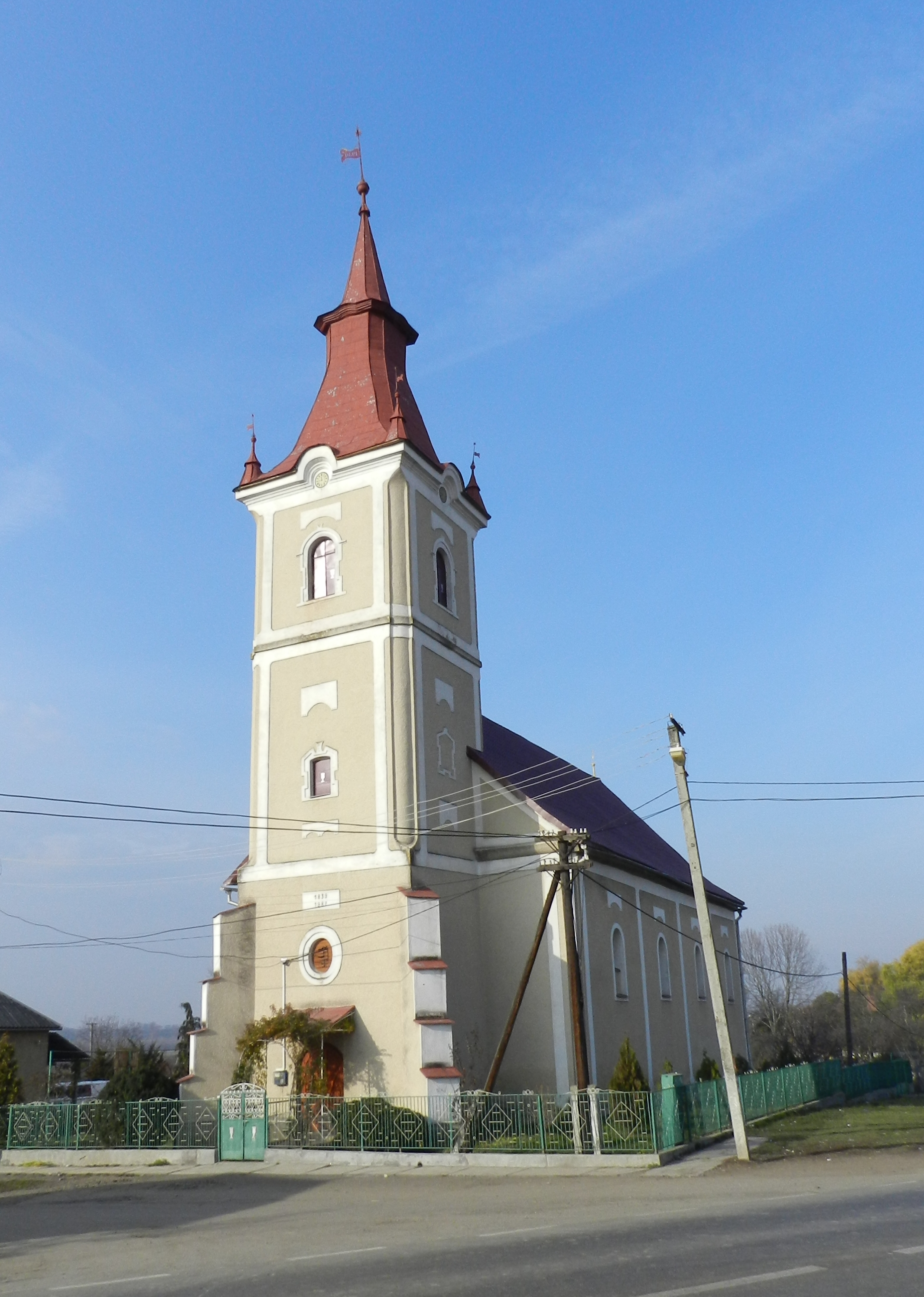 Реформатська церква, 1828 р.